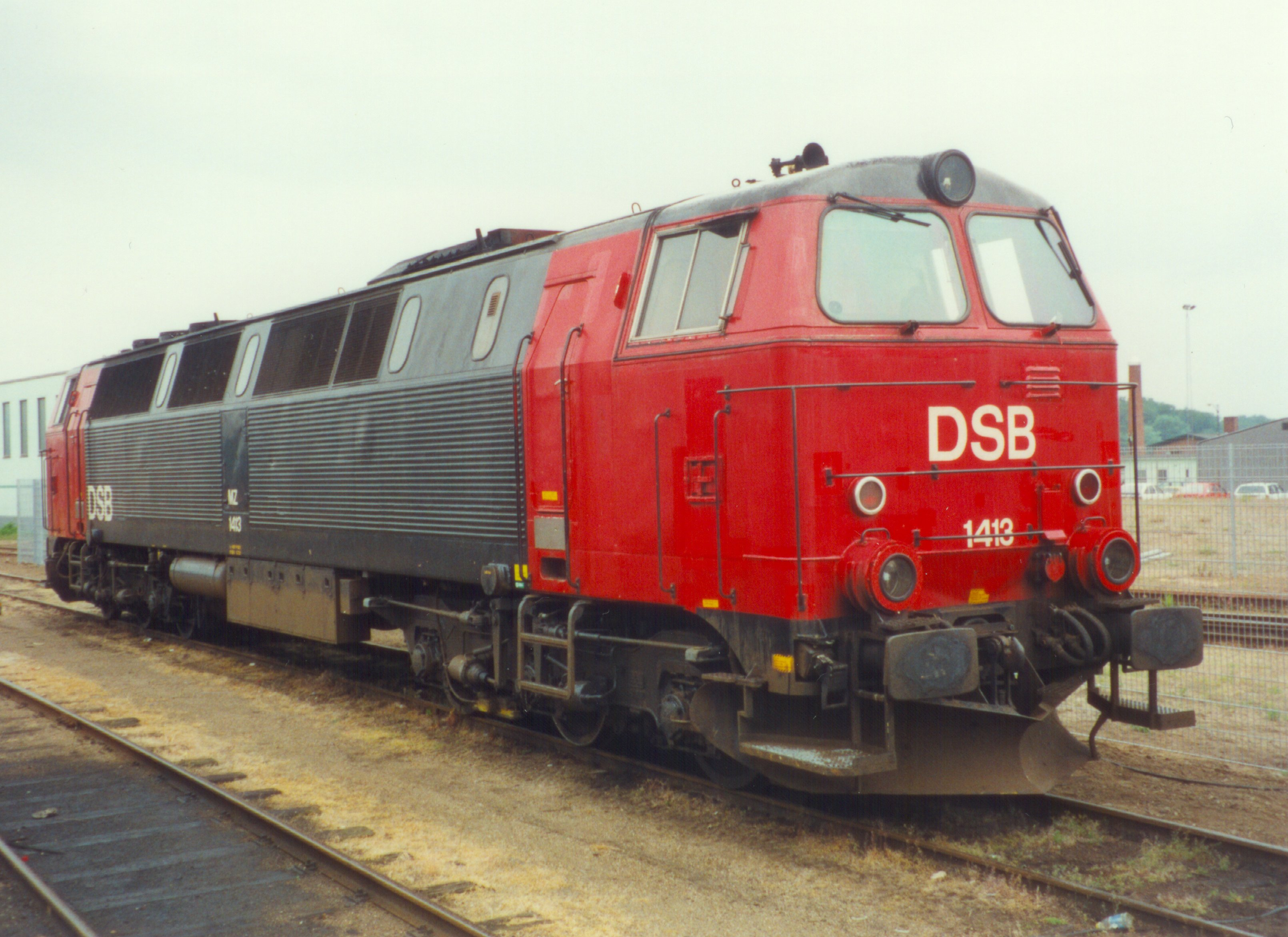 DSB's MZ 1413 in Odense.